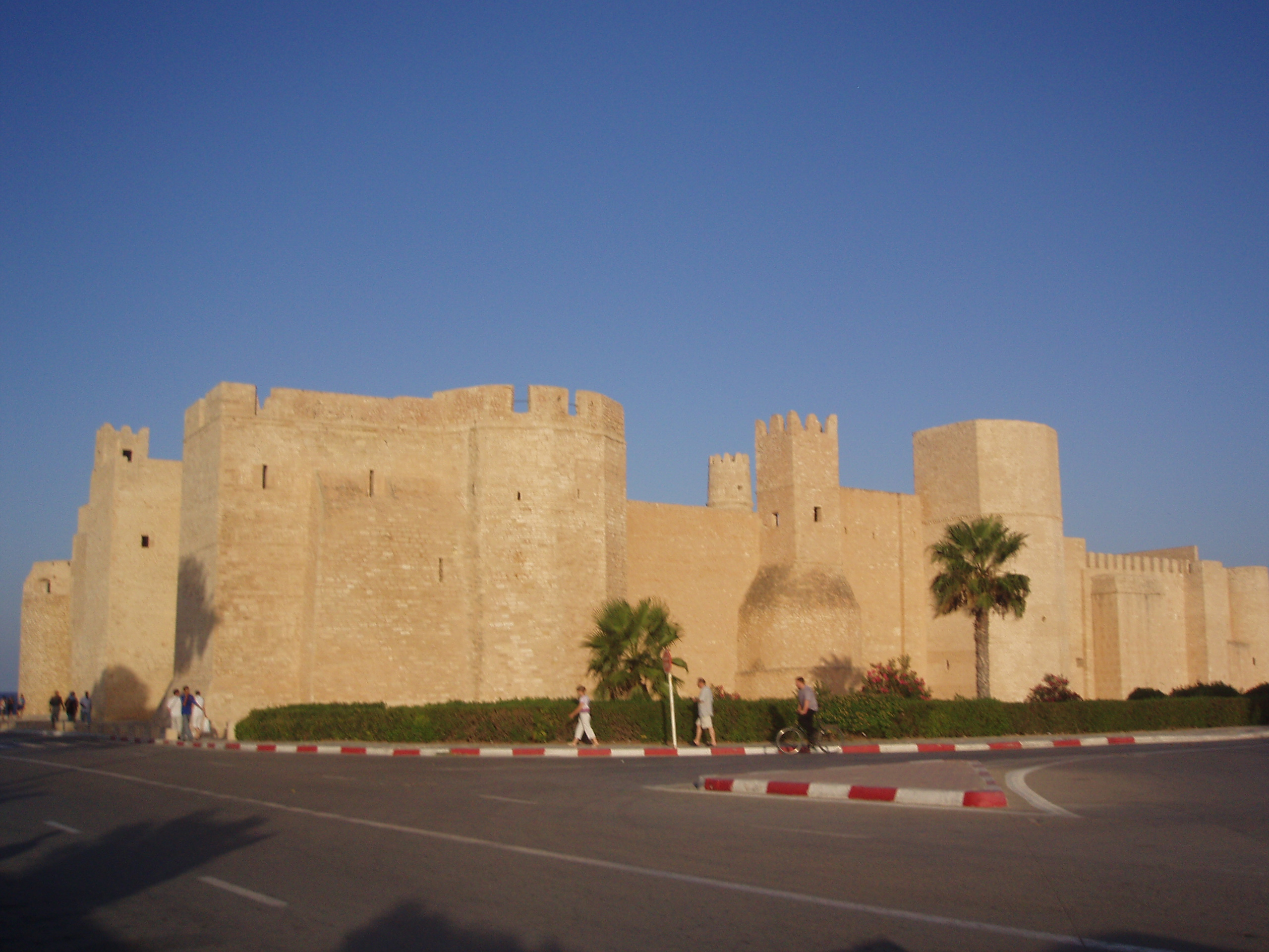 Kazbah of Monastir, Tunis